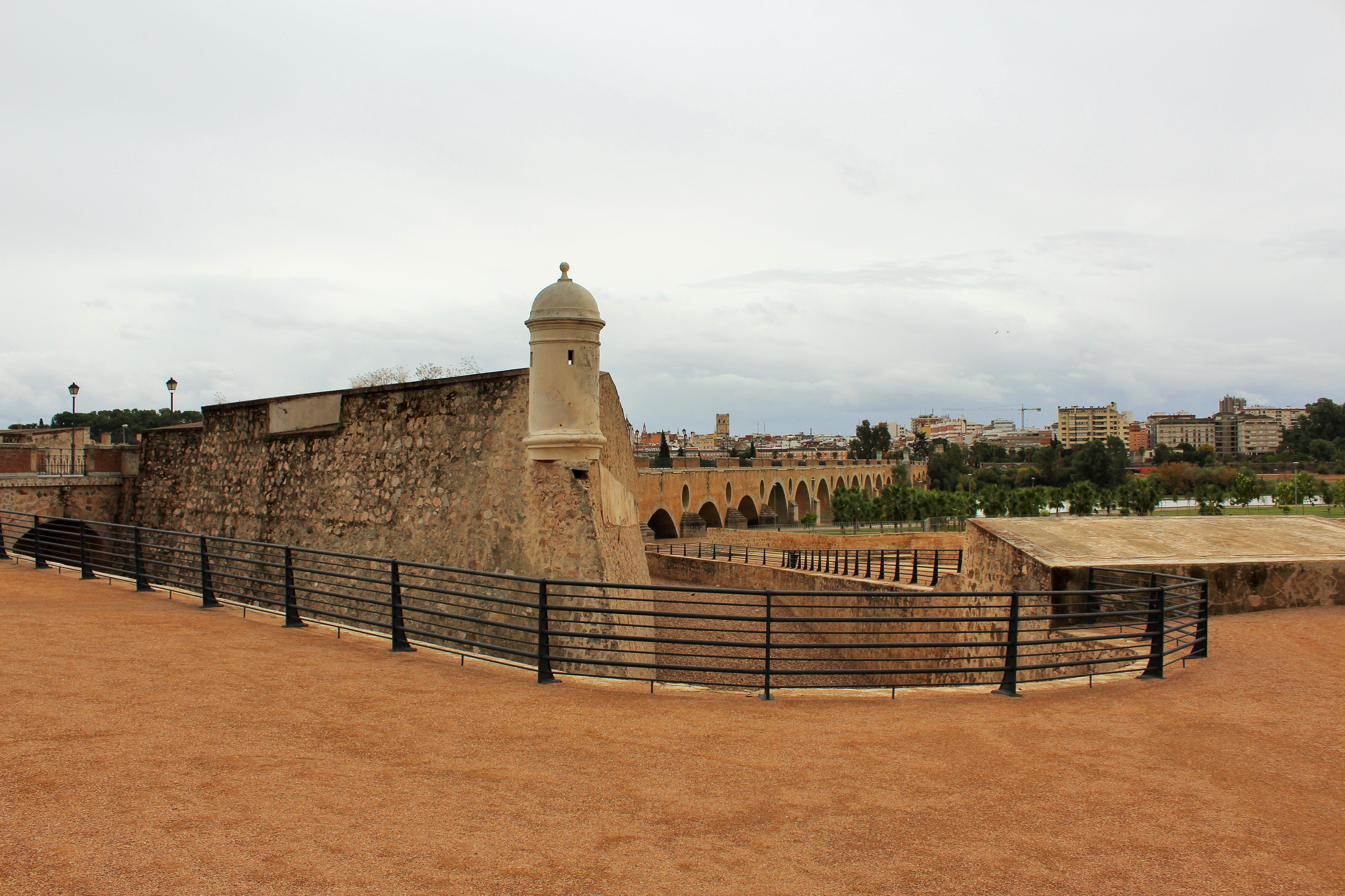 Exterior del flanco oeste